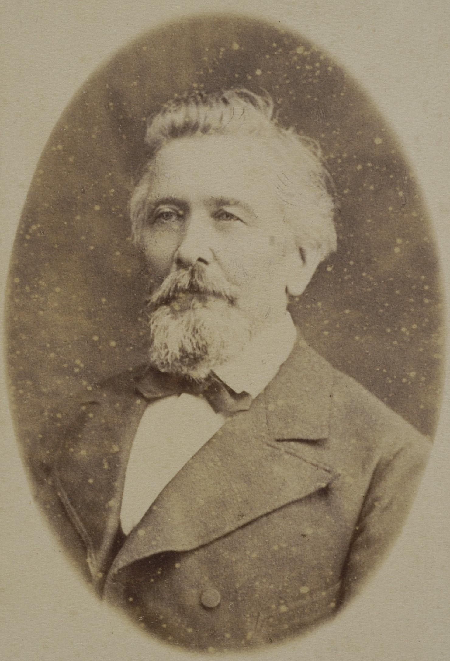 Edward Pawłowicz, ok. 1900